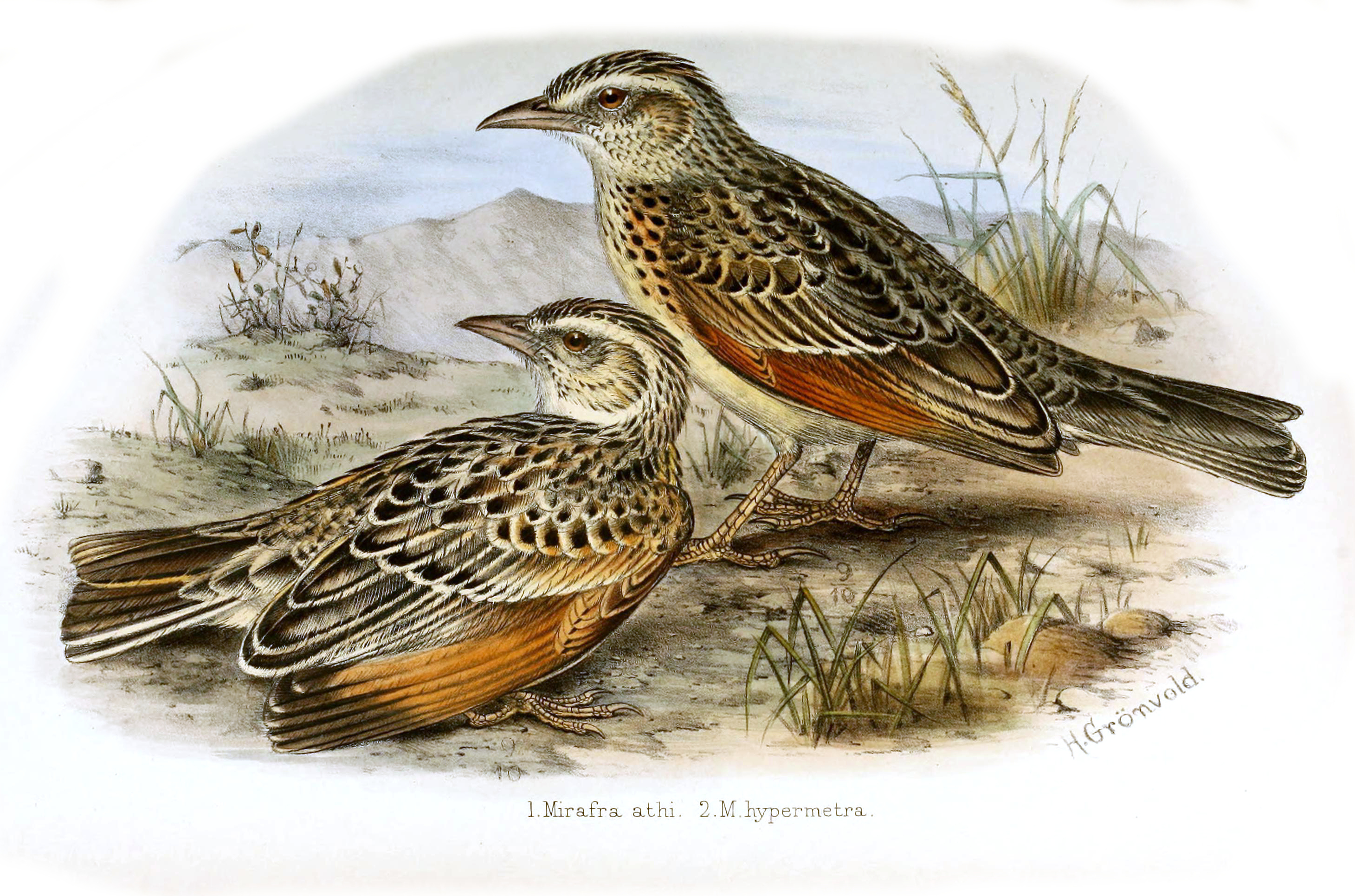 Mirafra athi, Mirafra hypermetra